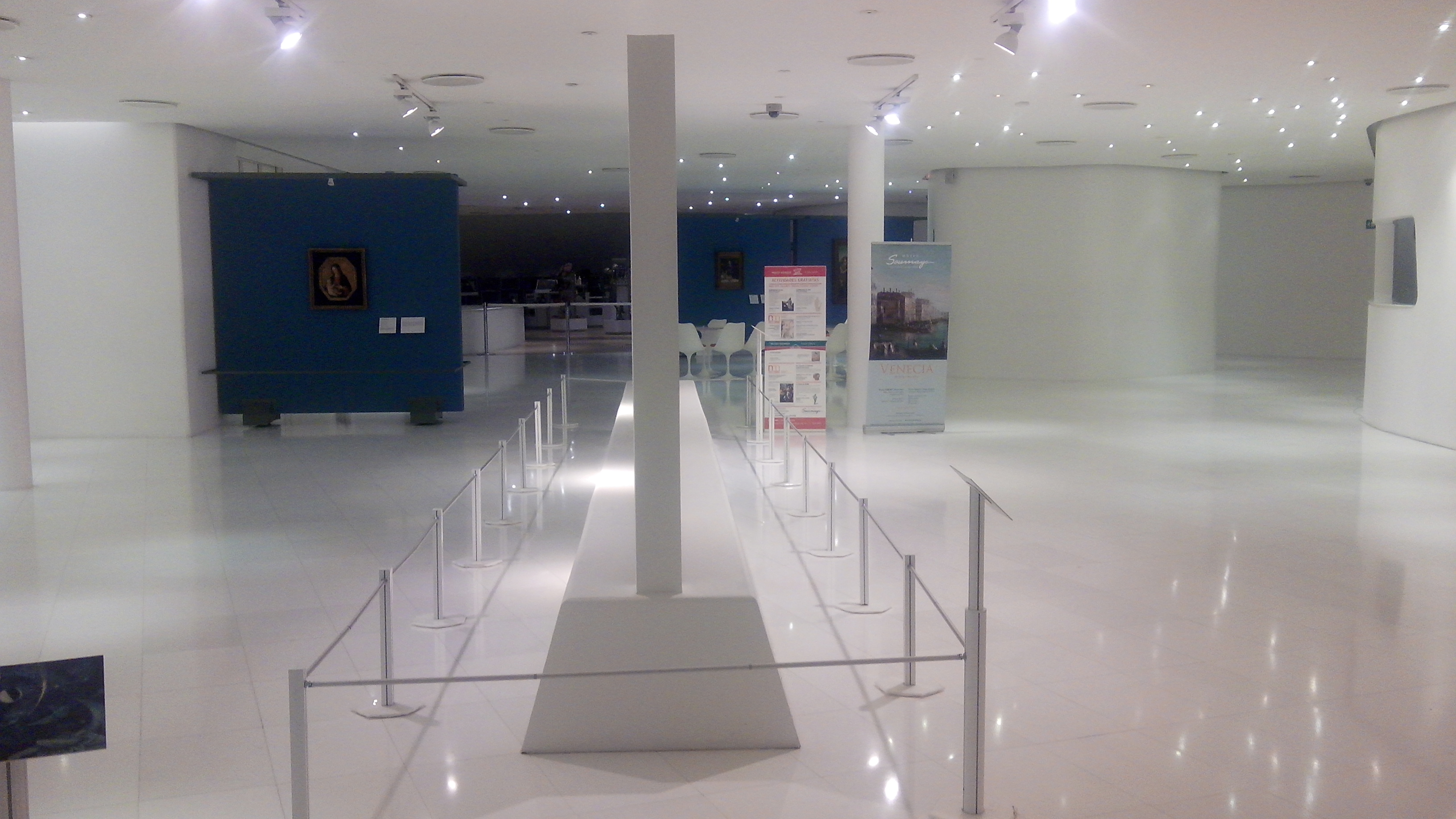 Montaje de Río Juchitán de Diego Rivera.